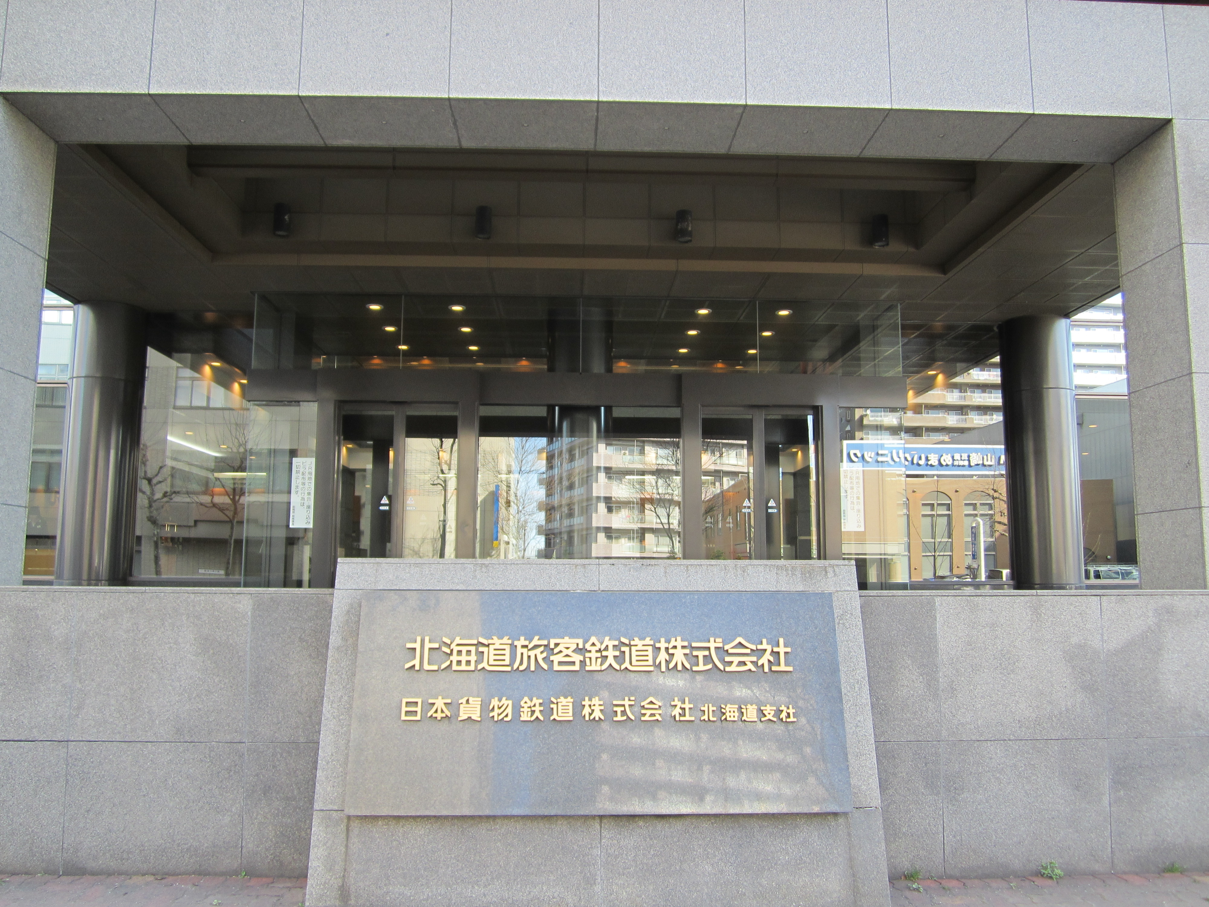 本社前と社名板